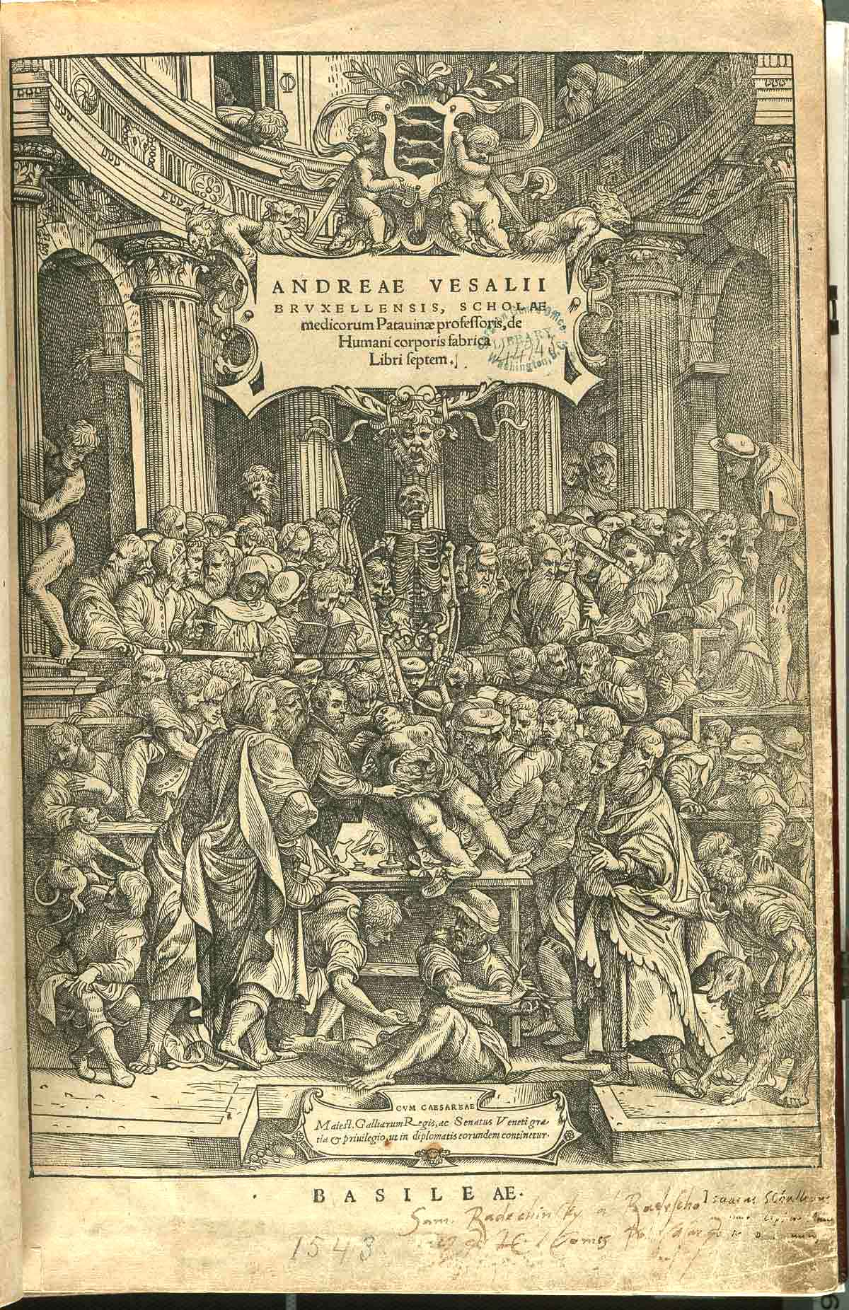 Andreas Vesalius: "De corporis humani fabrica libri septem" - title page